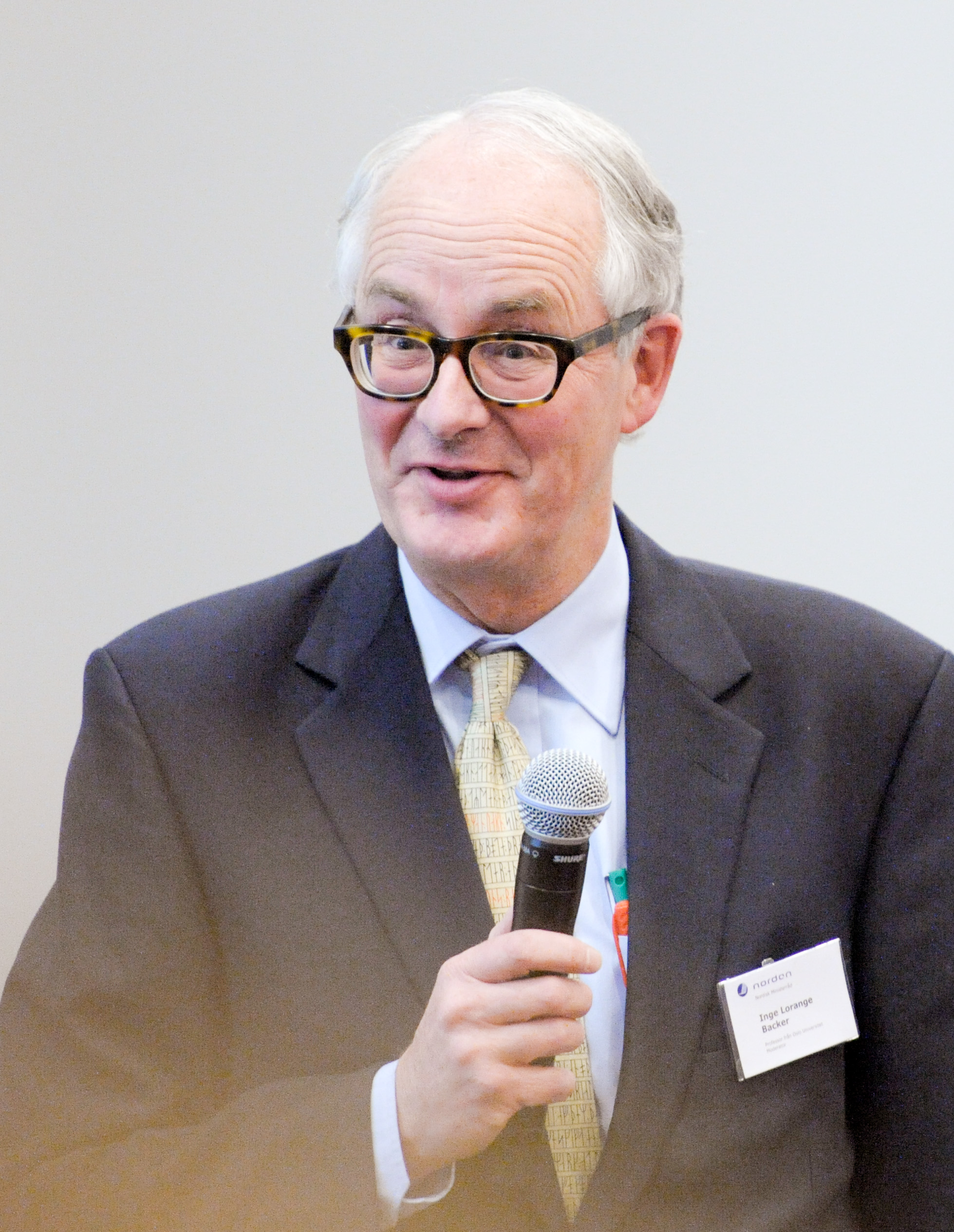 Inge Lorange Backer, professor vid Oslo universitet. Konferens om lagstiftningssamarbete i Norden 16-17 november 2010